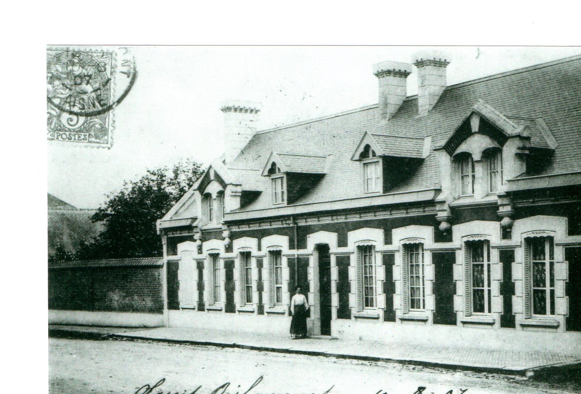 Carte photo de l'habitation d'Eugénie DERUELLE